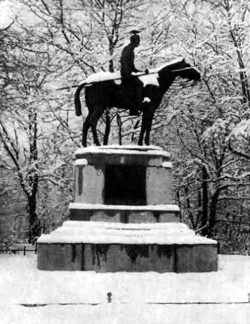 Ulanendenkmal im Stadtpark (ehemals Promenade) in Gleiwitz, 1928. Heute ist es das Chopin-Denkmal.